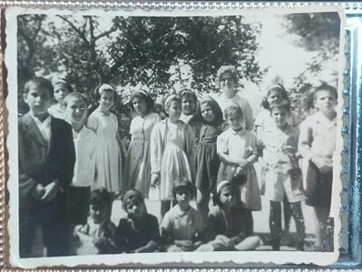 Μαθητές του Δημοτικού Σχολείου Πασαλιτών. Δασκάλα Ευαγγελία Γεωργαλάκη, έτος 1966-1967